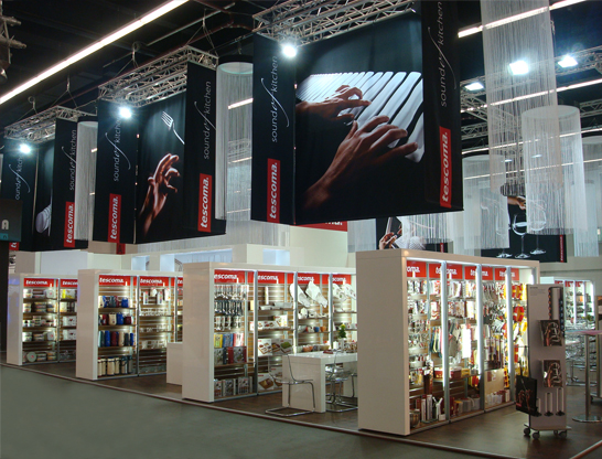 tescoma